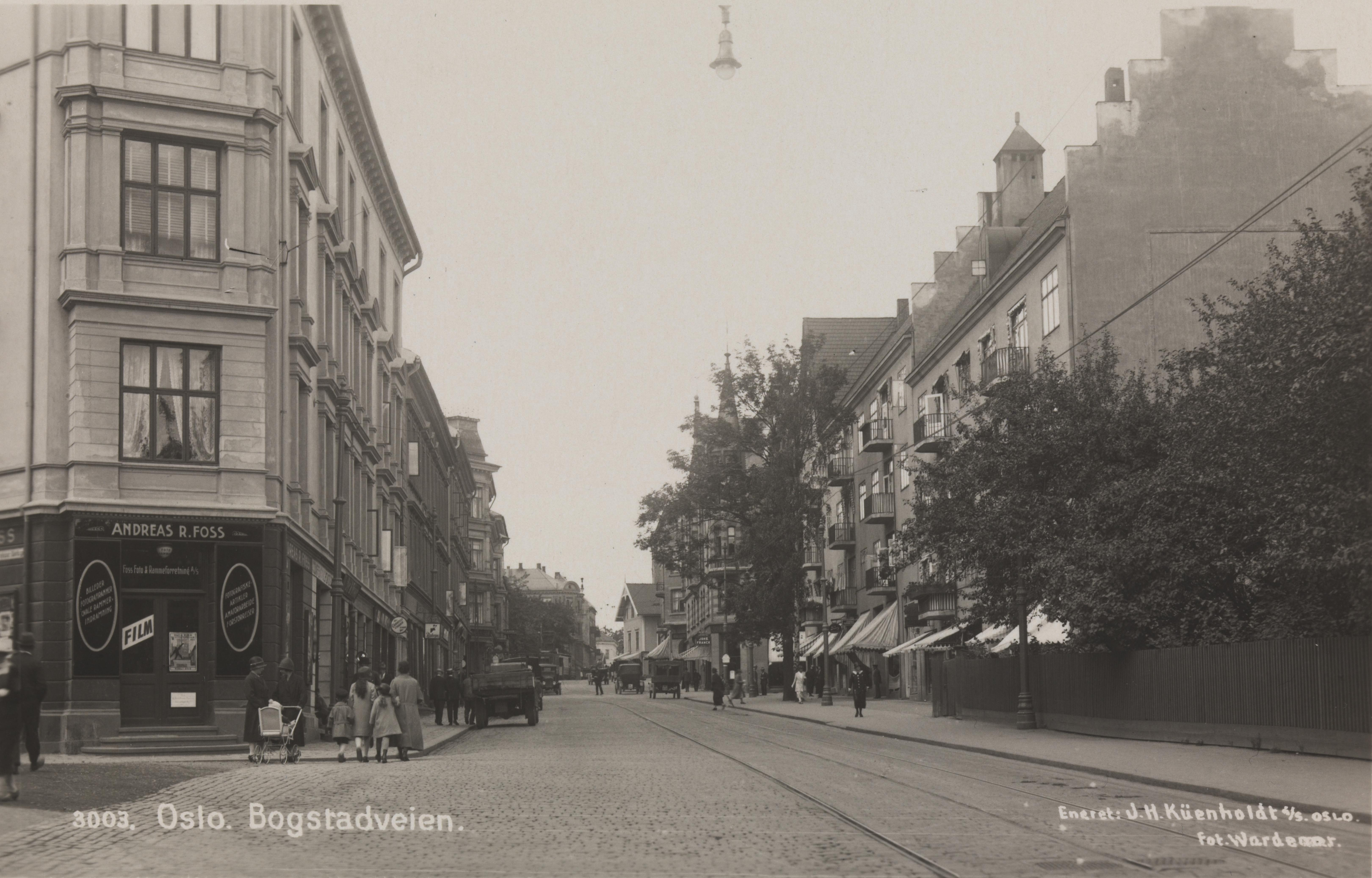 Bildet er hentet fra Nasjonalbibliotekets bildesamling